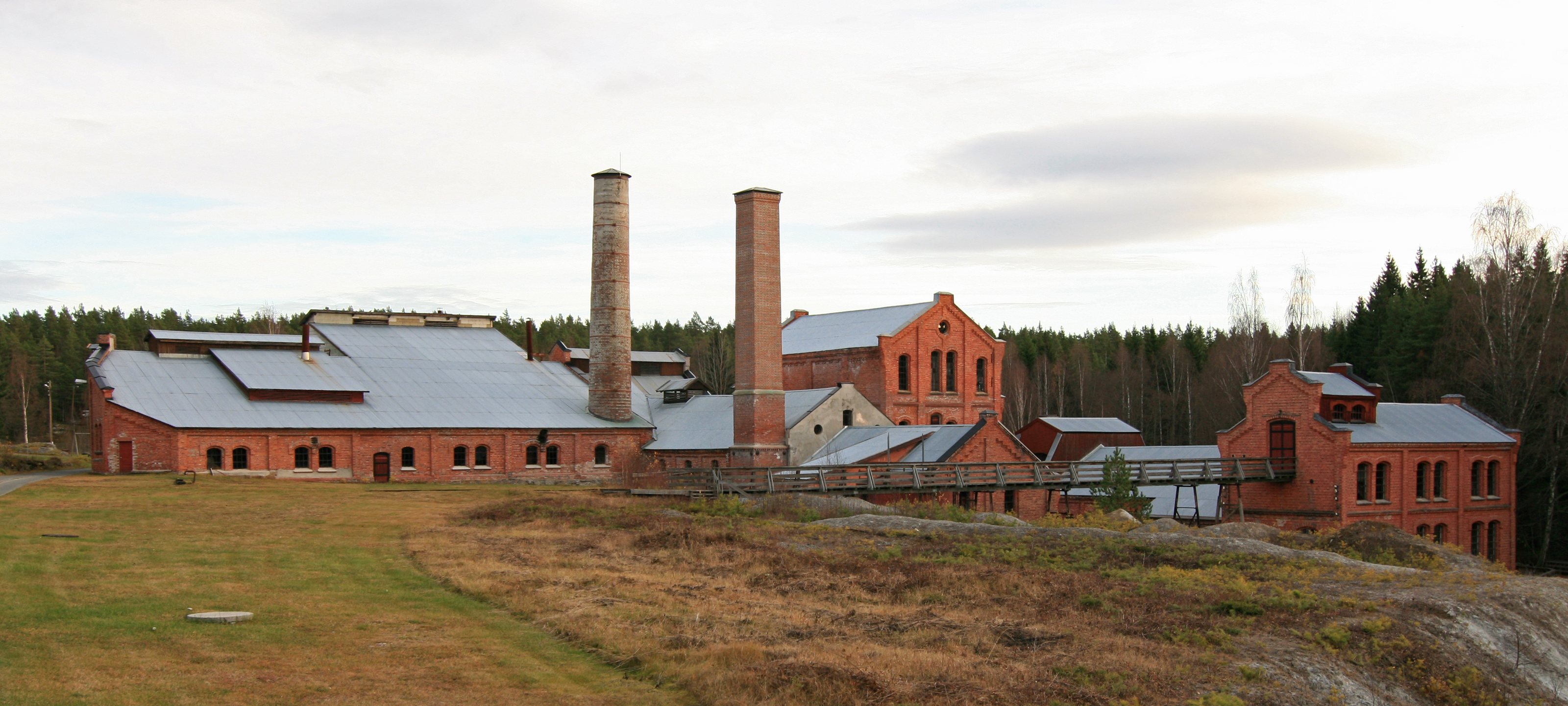 Klevfoss industrimuseum, Løten.